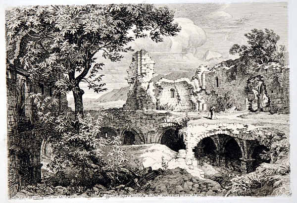 Gran Sasso in Italien - Ruine di una chiesa dell antica FORCONA negli Abruzzi